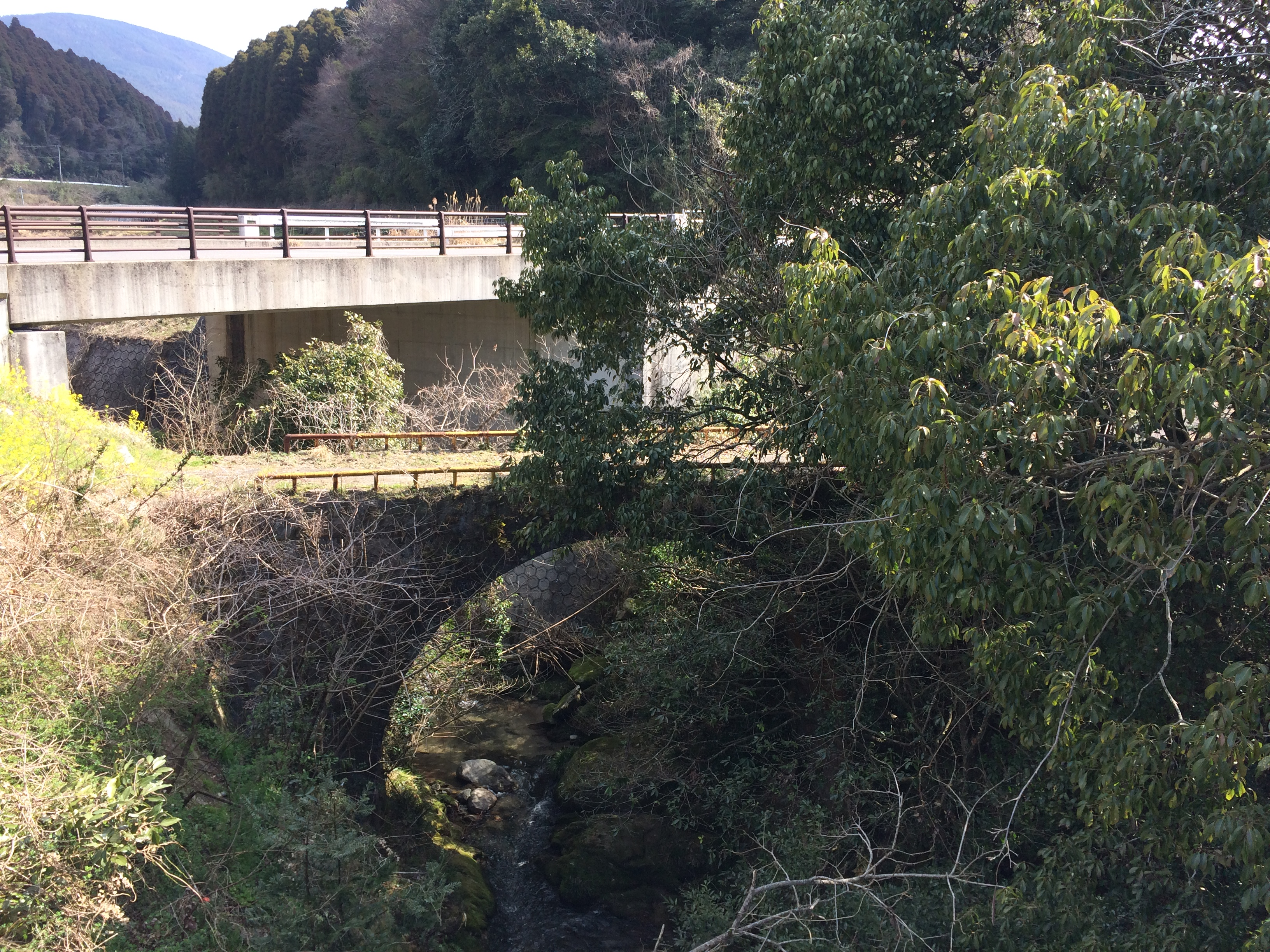 新旧 甚五郎橋（手前側は旧甚五郎橋 後方側は新甚五郎橋）